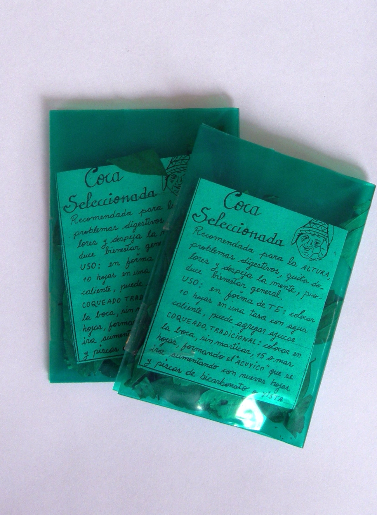 Sachets de feuilles de coca (Erythroxylum coca) vendus pour les touristes dans la province de Salta (Argentine). La population locale l'achète en vrac chez l'épicier.